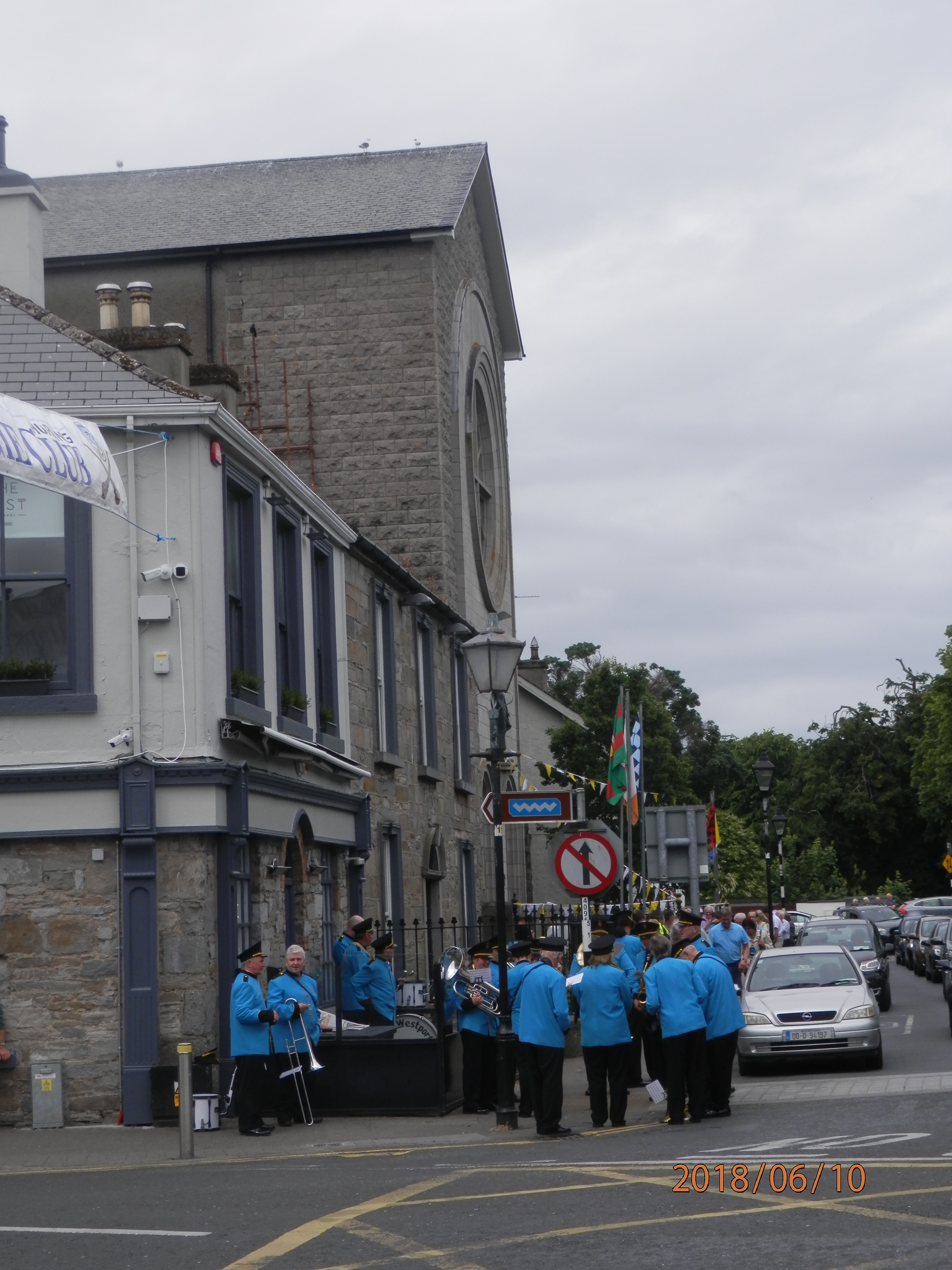 Fanfare avant le début de la procession dans les rues de Westport, Co. Mayo